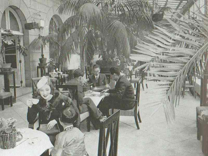 昭和15年、朝鮮京城の朝鮮ホテルでの崔承喜